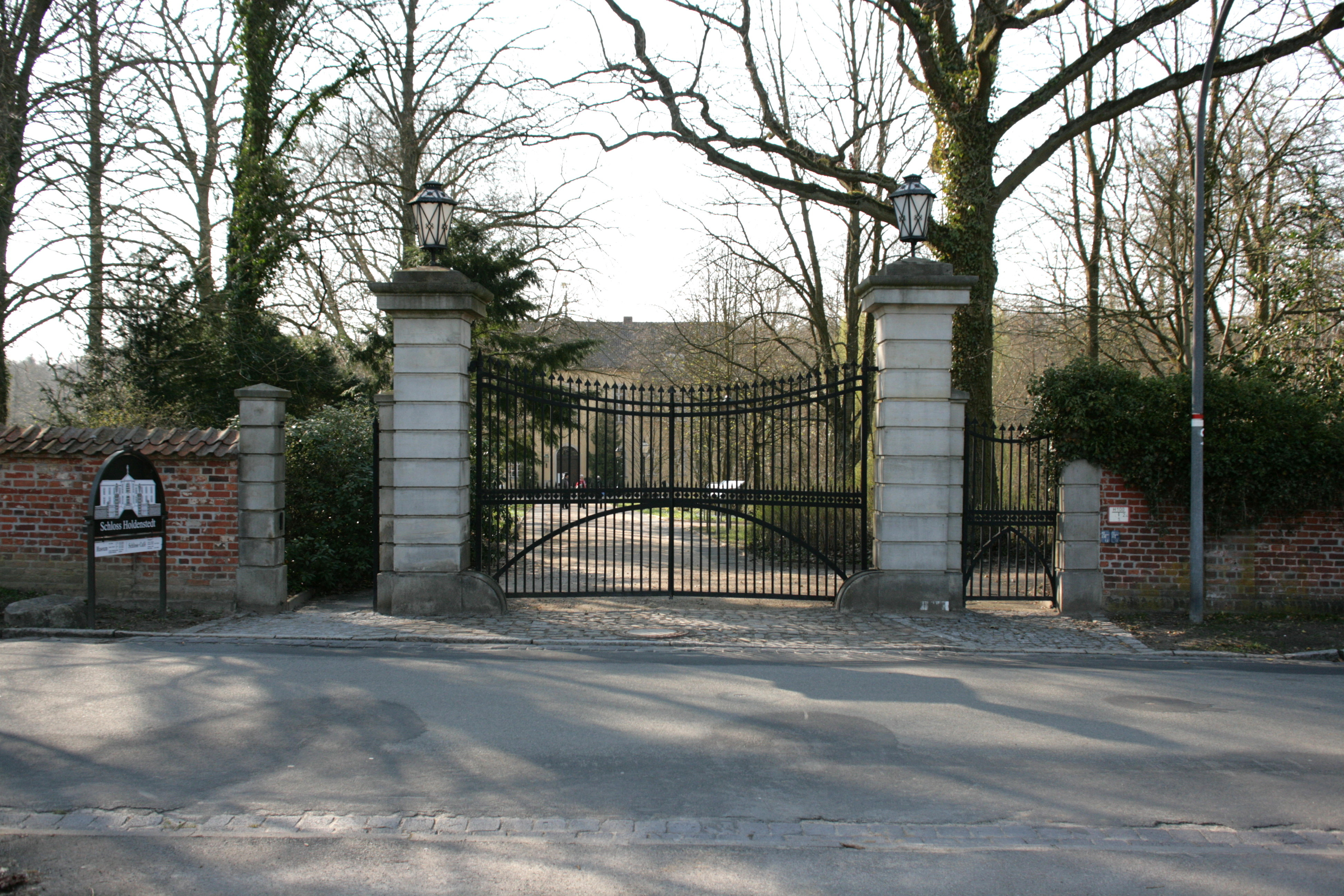 Schloss Holdenstedt, Schloßstraße 4 in Holdenstedt, Uelzen